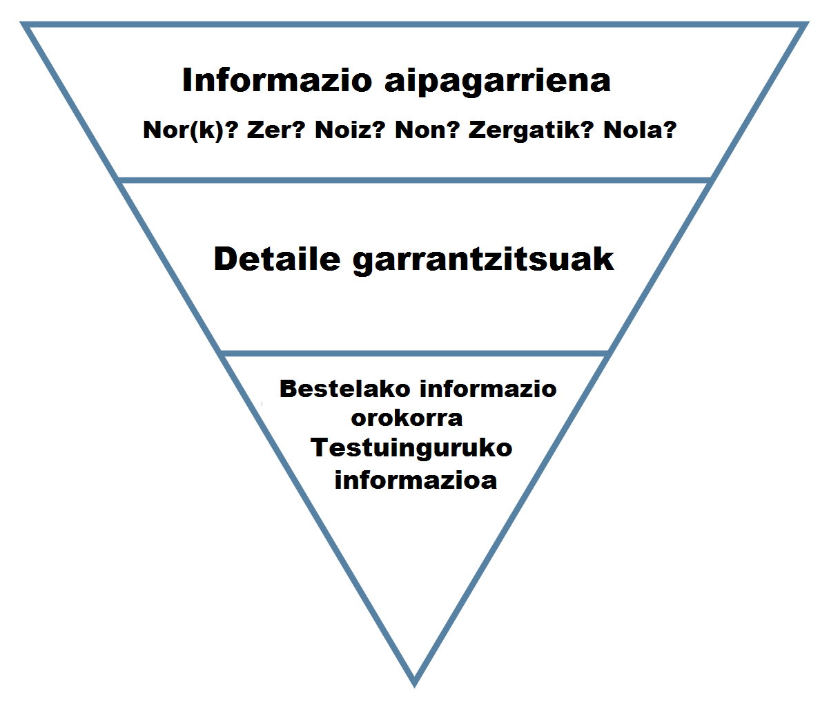 Kazetaritzako alderantzizko piramidea, Wikipediako artikuluetan informazioa antolatzeko eredua. Jatorrizko fitxategia